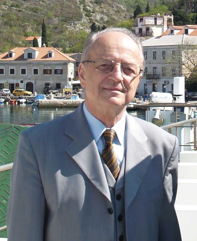 Akademik Petar Strčić, povjesničar